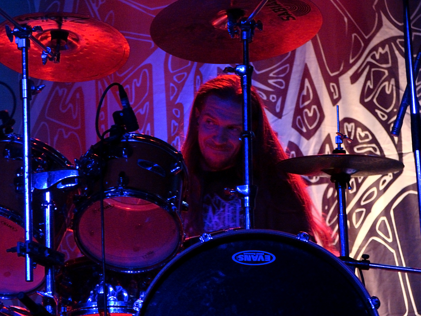 Unleashed en concert à l'Elysée-Monmartre, Paris, le 2/12/2007.